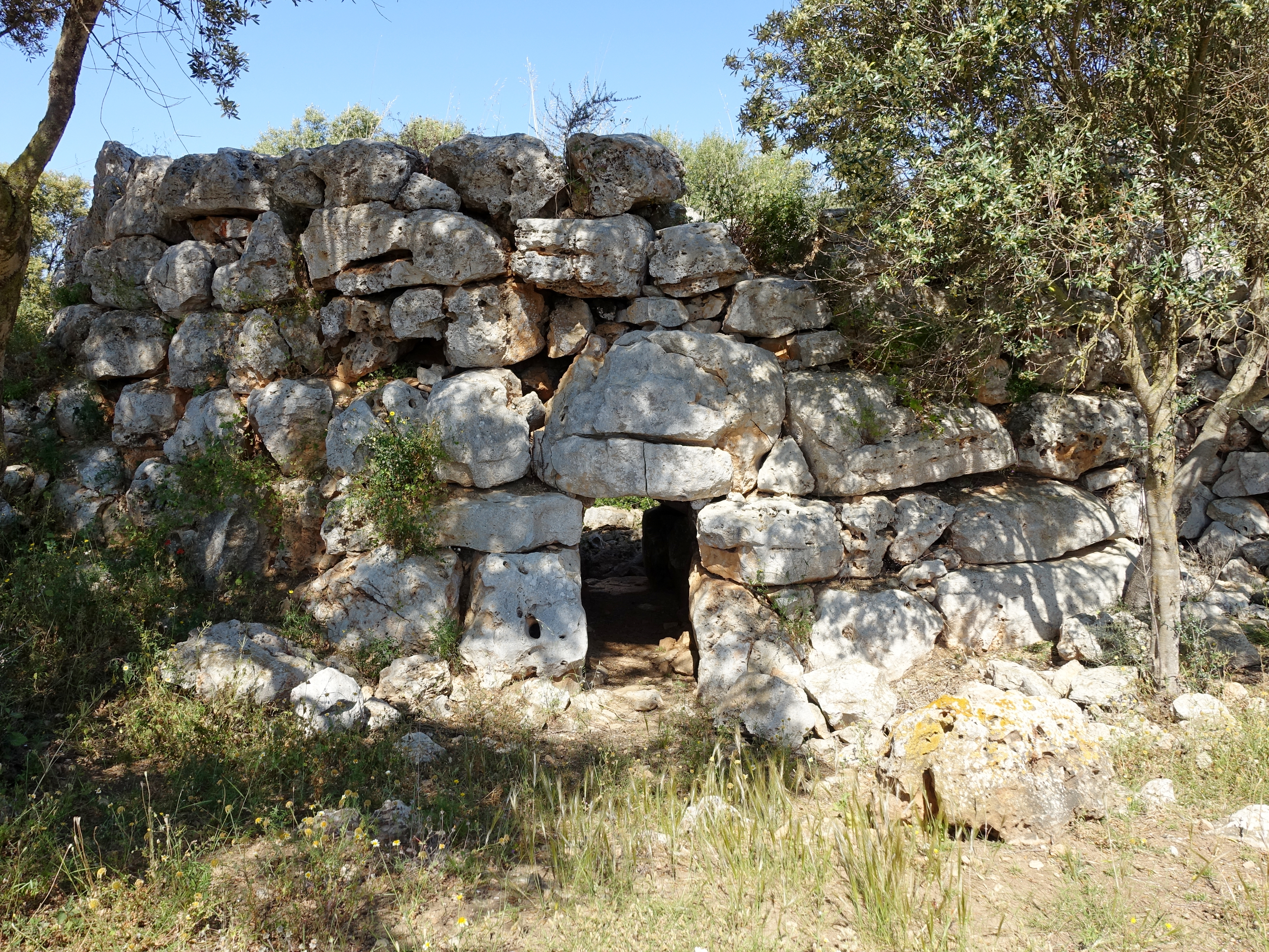 Runder Talaiot Joana der talaiotischen Siedlung es Antigors in der Gemeinde Ses Salines, Mallorca, Spanien